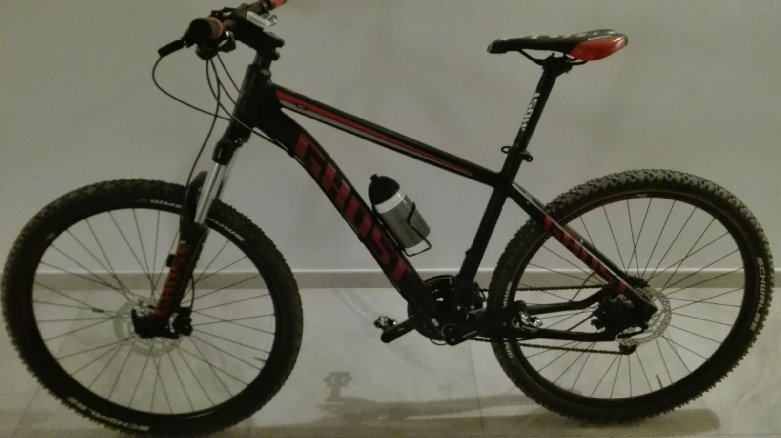 Bicicleta de montaña suspension delantera y frenos de discos en ambas ruedas